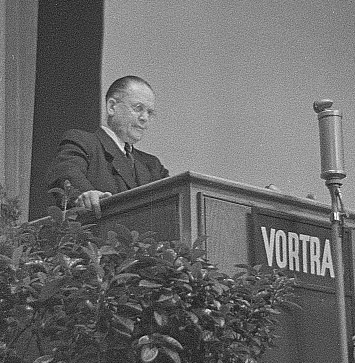 Bildausschnitt eines fotografischen Portraits des referierenden Prof. Robert Schröder beim Gynäkologischen Kongress 1950 in der Kongresshalle in Leipzig